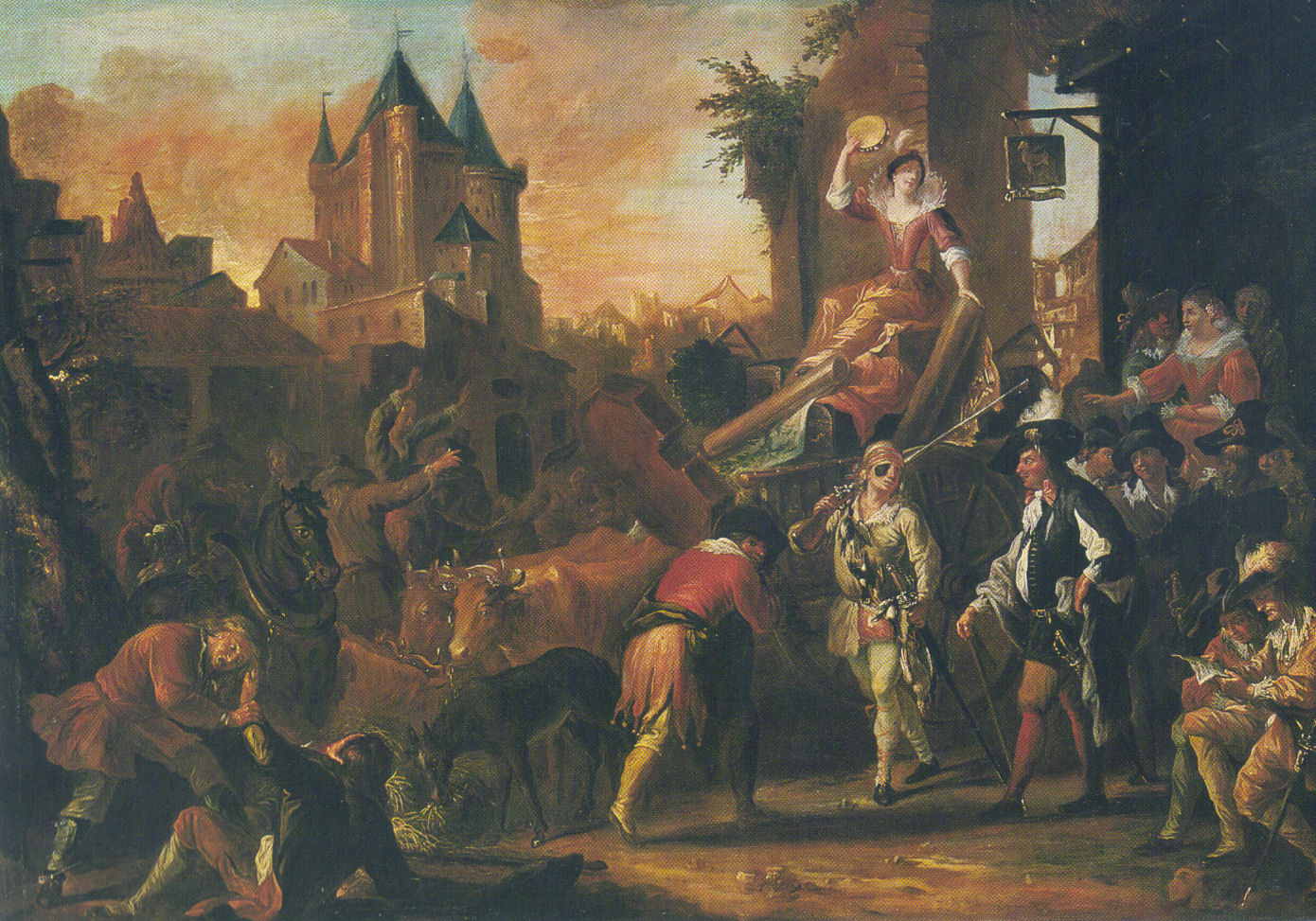 Peinture de l'arrivée des comédiens au Mans, d'après le roman de Scarron: "Le Roman Comique". Cette peinture fait partie d'une série de vingt, commandée par le maréchal de Tessé, René III de Froulay (1648-1725) pour un salon de son château de Vernie dans la Sarthe. Au départ attribuées à Jean Baptiste Coulom, la signature sur l'une d'entre elles permet d'authentifier P.-D. Martin comme leur auteur.